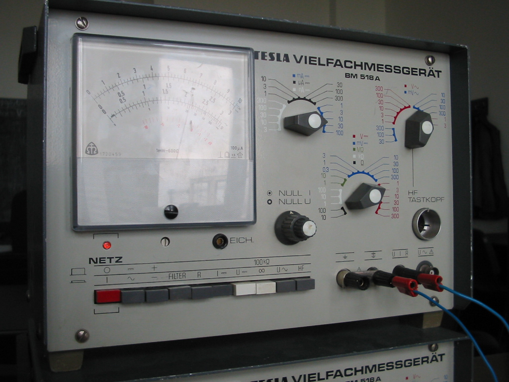 Analogue multimeter Tesla BM 518 A